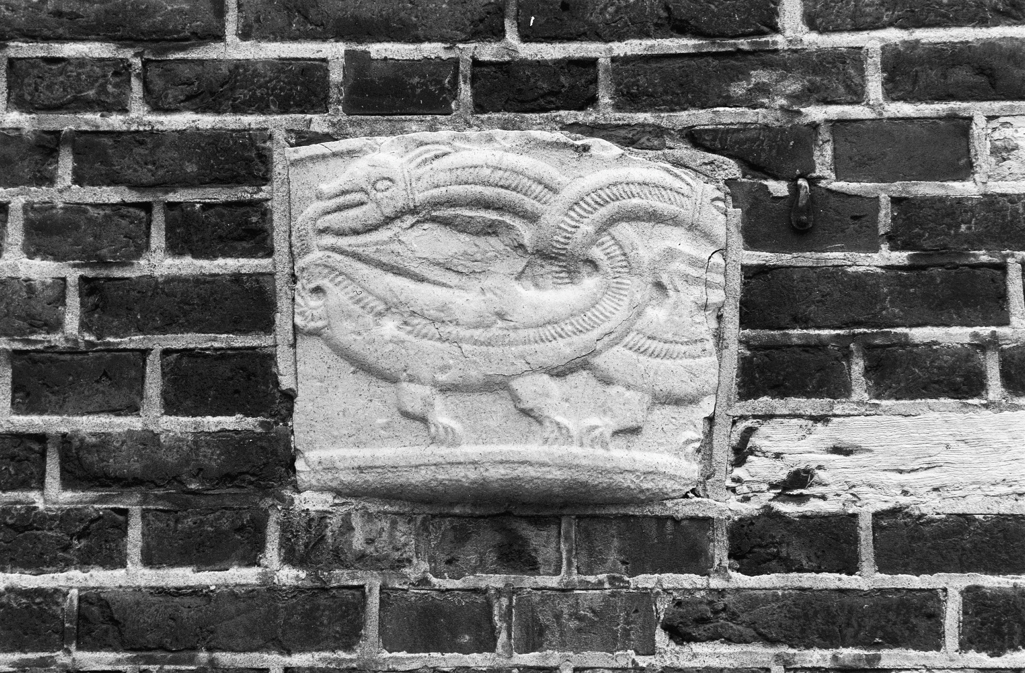 Rooms-Katholieke Kerk: INTERIEUR, DOOPVONT IN MUUR, FRAGMENT